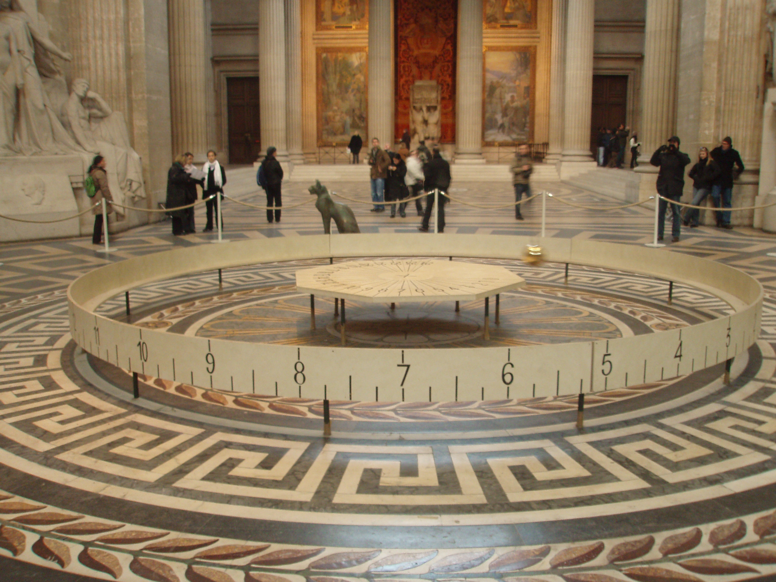 Pendule de Foucault, Panthéon